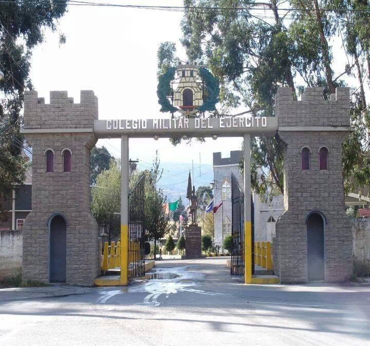 Puerta principal del colegio militar del ejercito de Bolivia